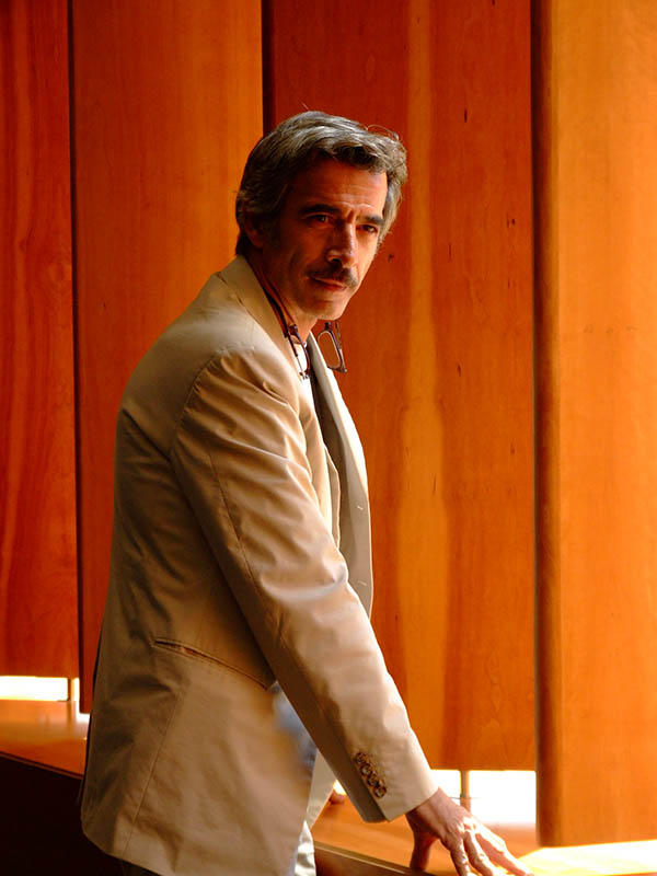 Imanol Arias